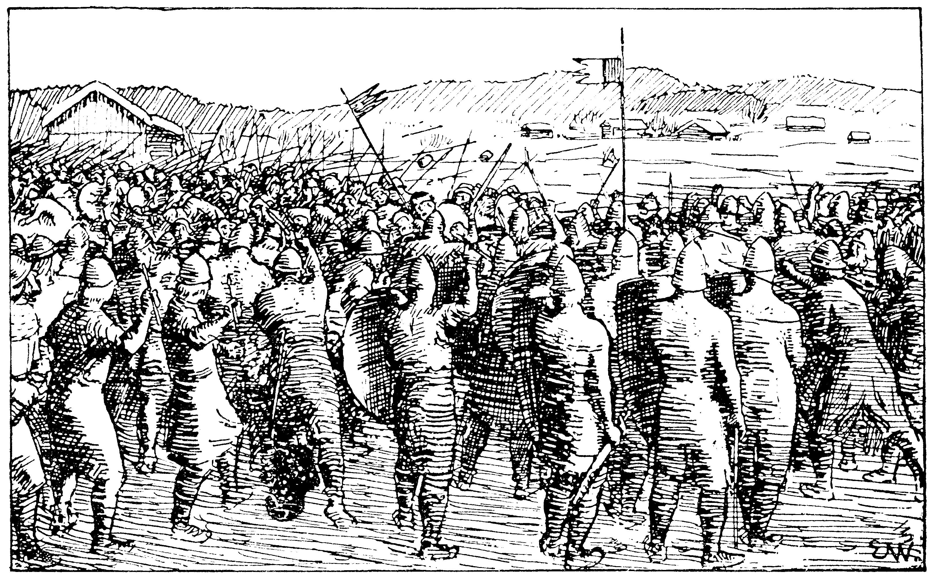 Erik Werenskiold: Illustration for Magnus Erlingssons saga, Heimskringla 1899-edition. nn: «Slaget på Re» ru: Сражение при Ре. Иллюстрация Эрика Вереншёлля к «Саге о Магнусе сыне Эрлинга» («Круг Земной», издание 1899 года).